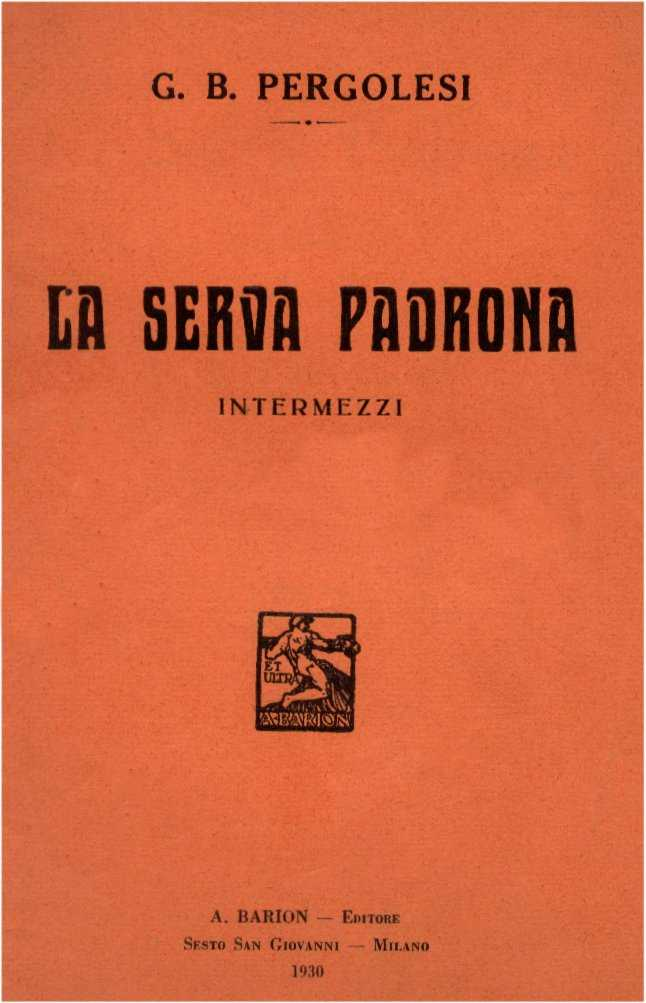 Copertina libretto "La serva padron" intermezzi musica di G. B. Pergolesi - editore Attilio Barion Sesto San Giovanni - Milano 1930